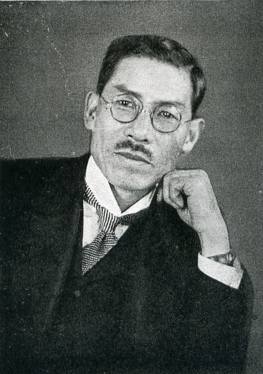 この写真は、勝田主計（1869-1948）の写真です。